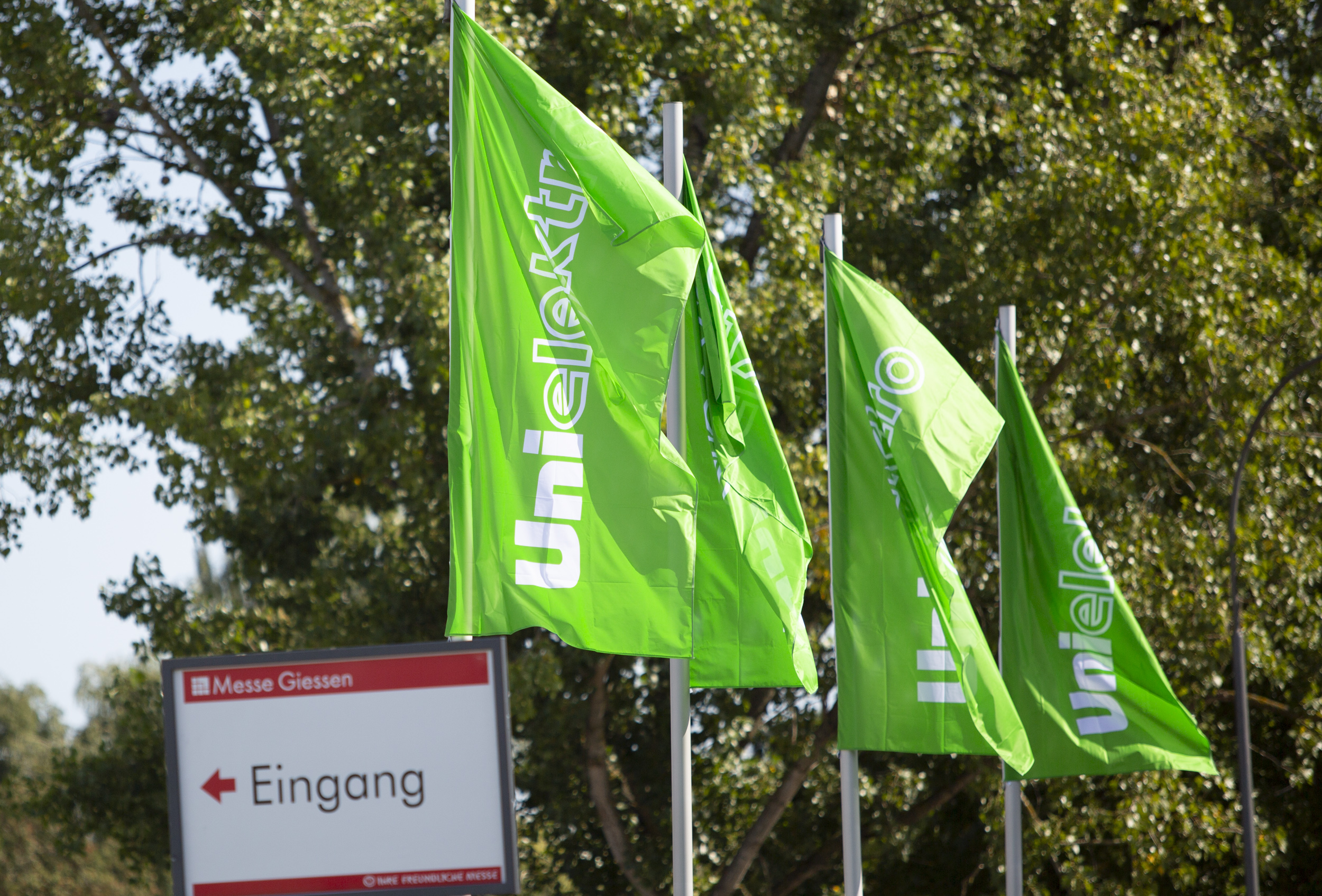 UNI ELEKTRO Fachmesse Gießen